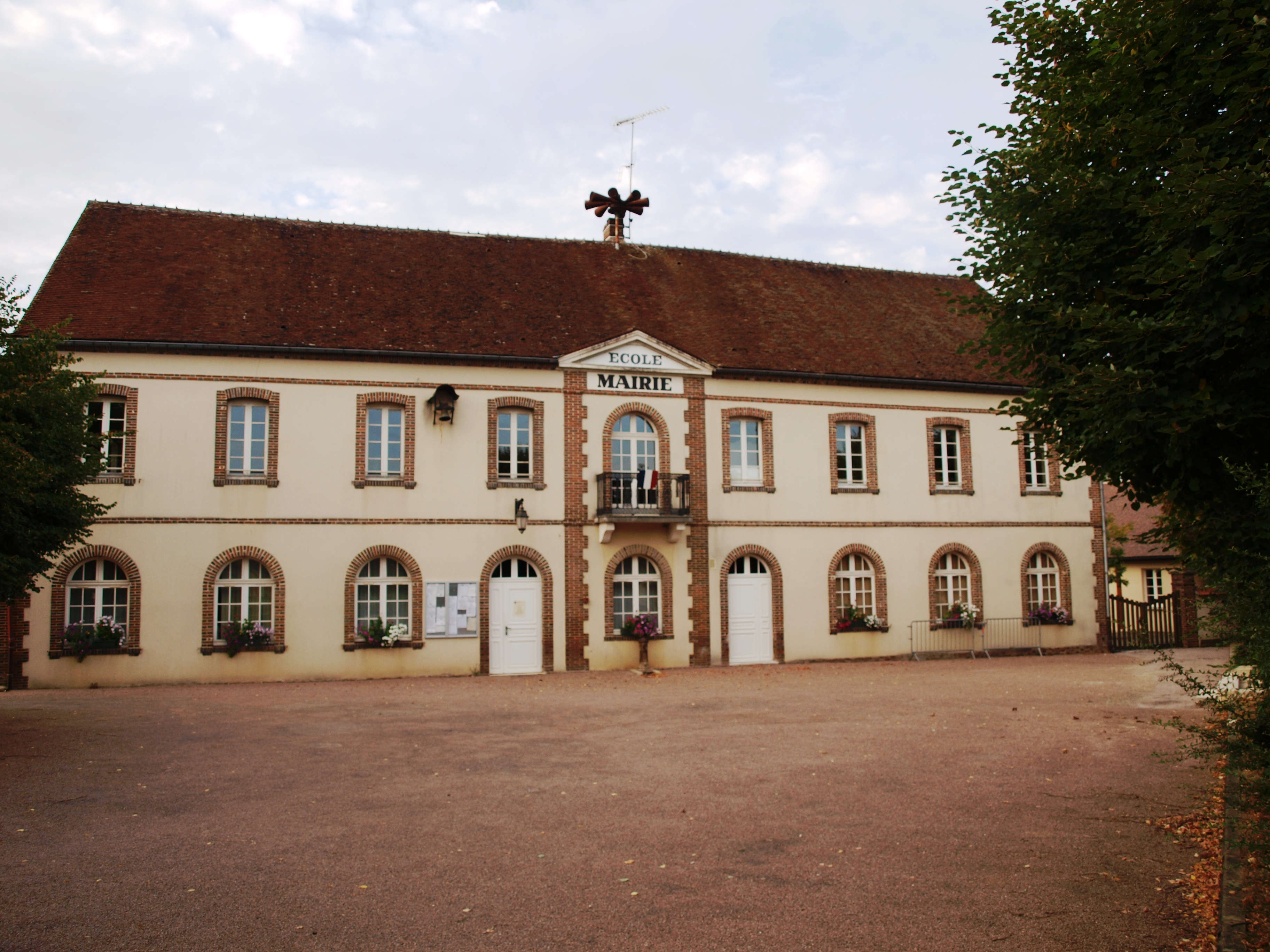 La Ferté-Loupière (Yonne, France) ; la mairie